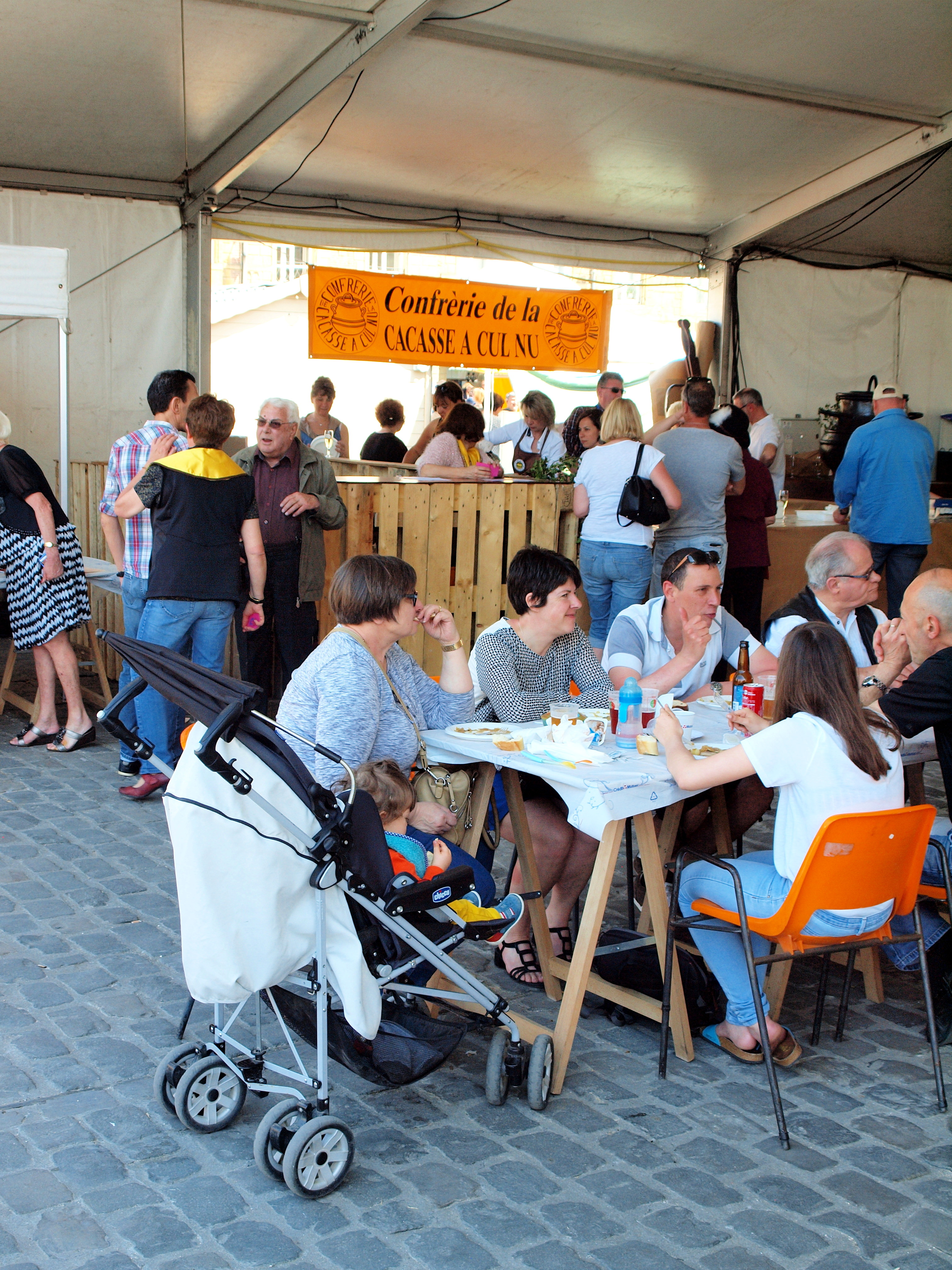 Place Ducale de Charleville-Mézières (Ardennes, France) , en mai 2016, lors du 13e festival des Confréries en Ardenne.